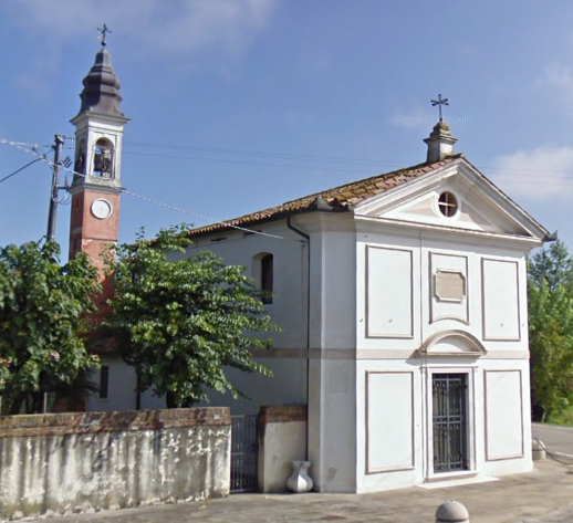 Chiesetta dello zignol